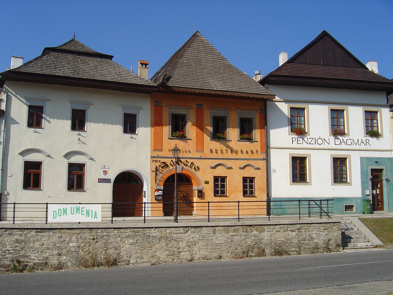 Spišská Sobota square